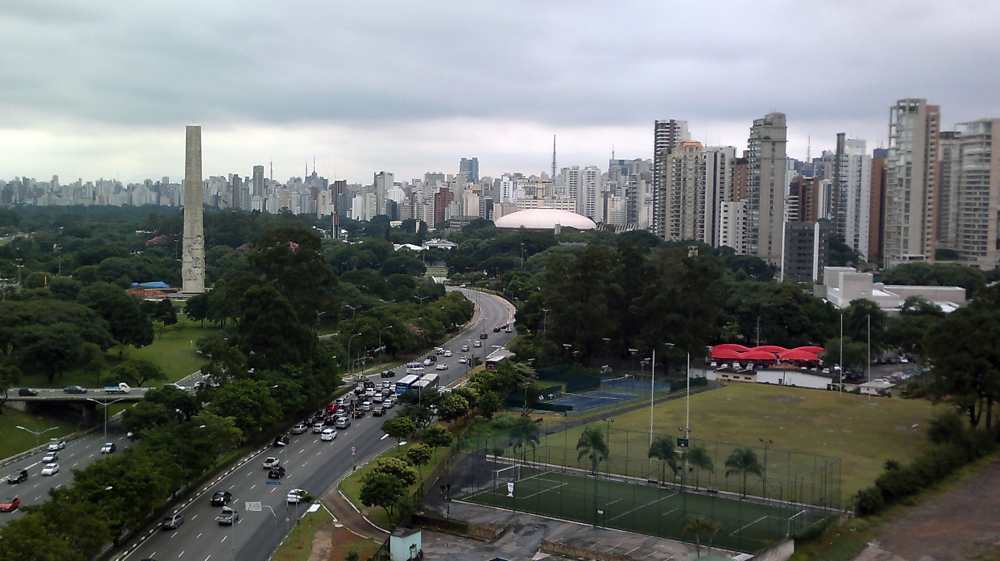 Avenida 23 de maio, Obelisco ao fundo Ginásio Estadual Geraldo José de Almeida